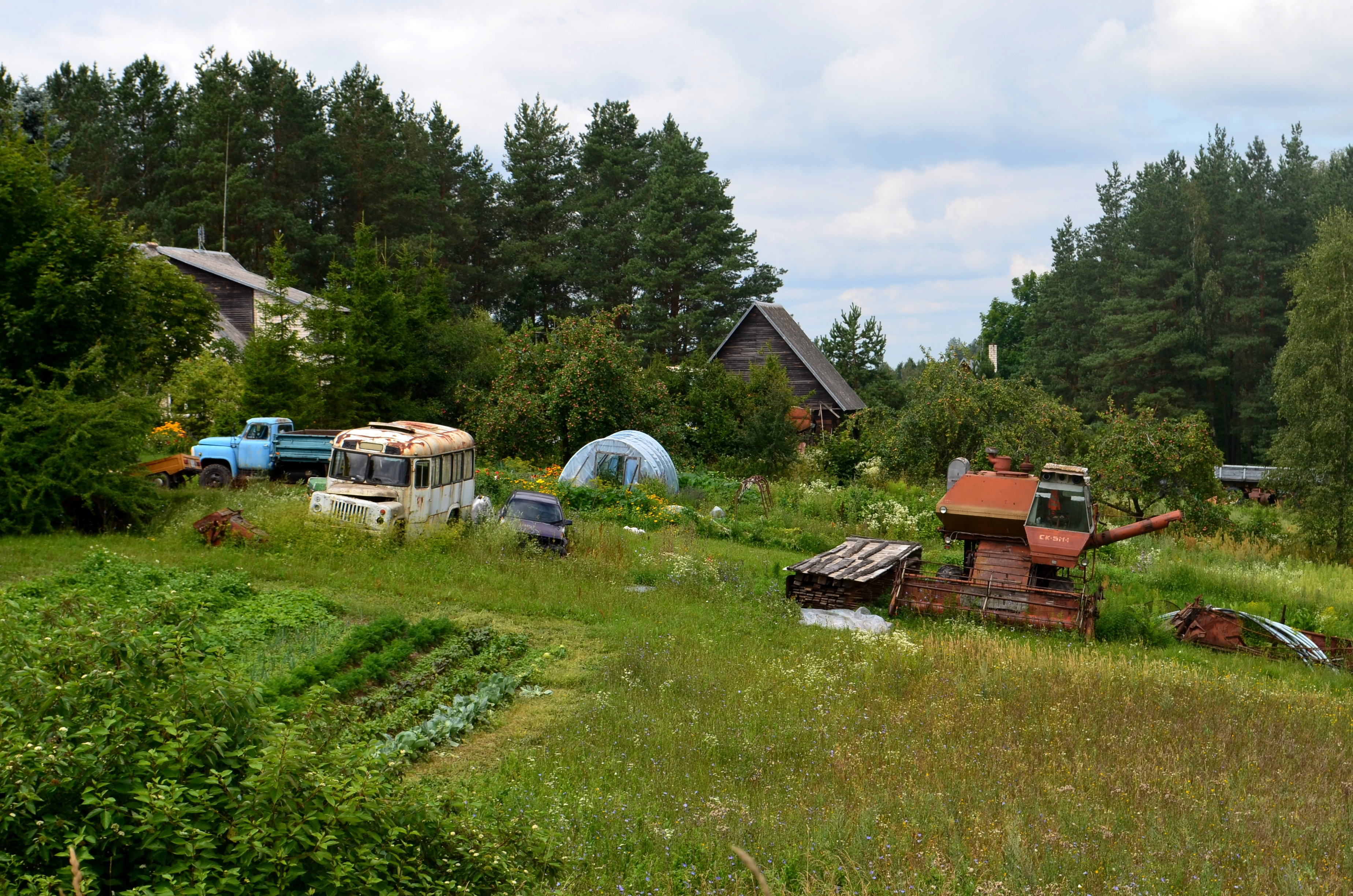 Sena technika, Antalksnės k., Ignalinos raj.